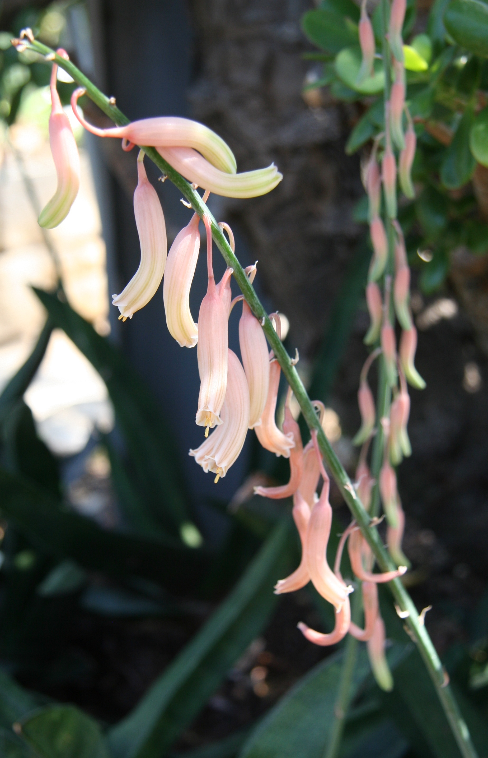 Gasteria acinacifolia im Botanischen Garten Berlin